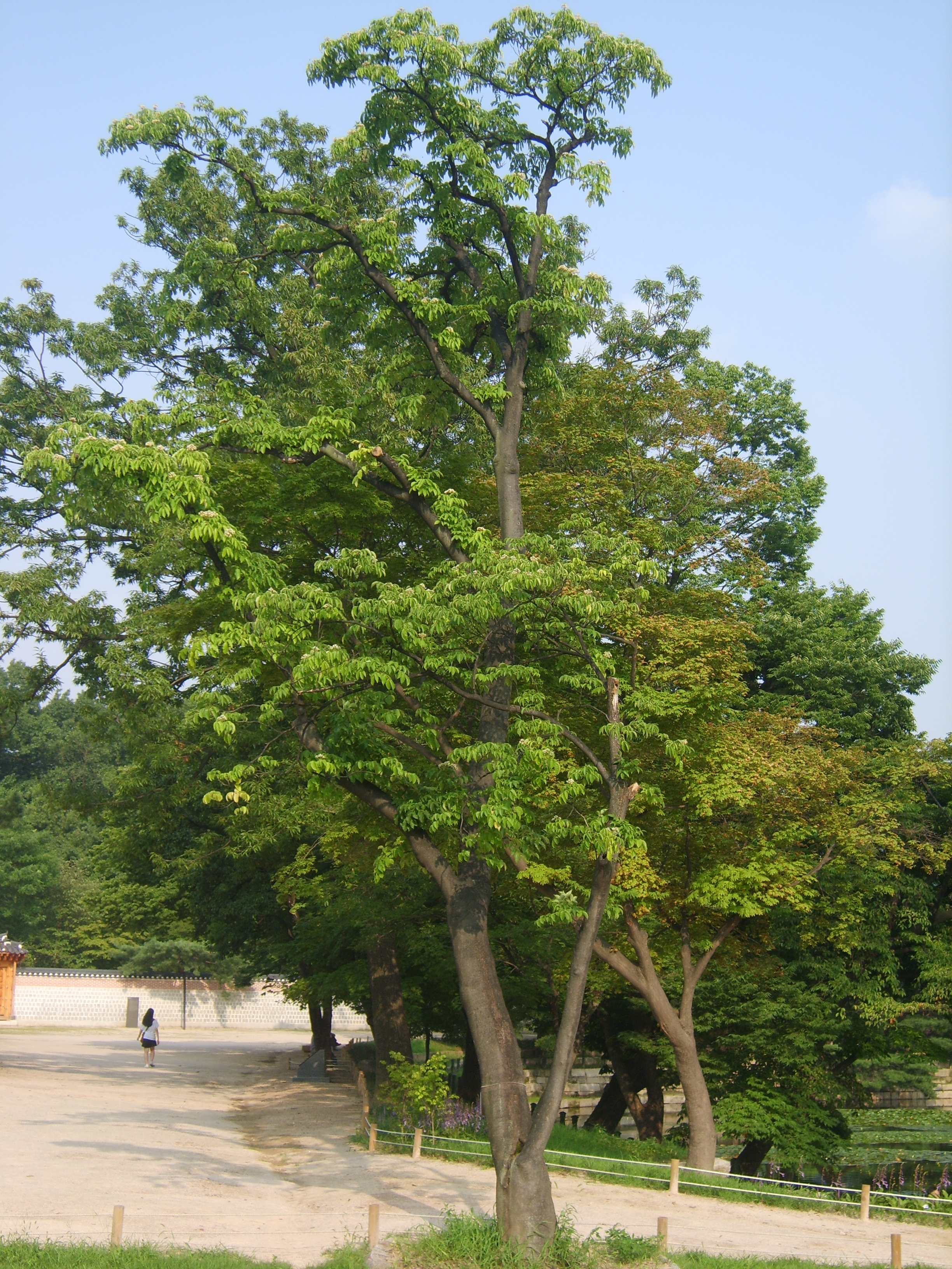 Tetradium daniellii in Geongbokgung, Korea